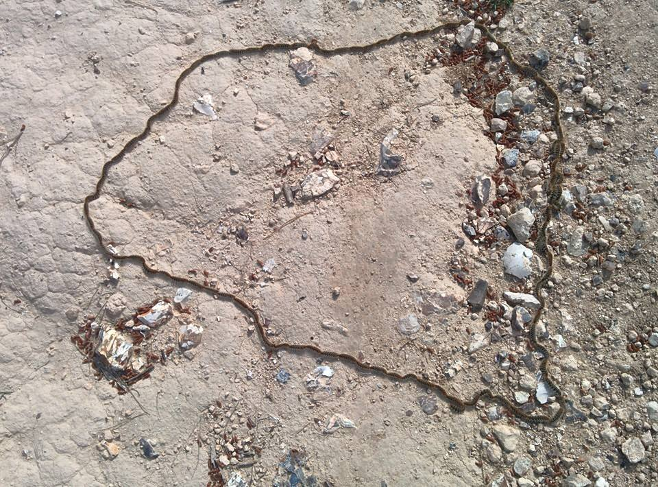 התקדמות על פני השטח במעגל משורשר של תהלוכן האורן